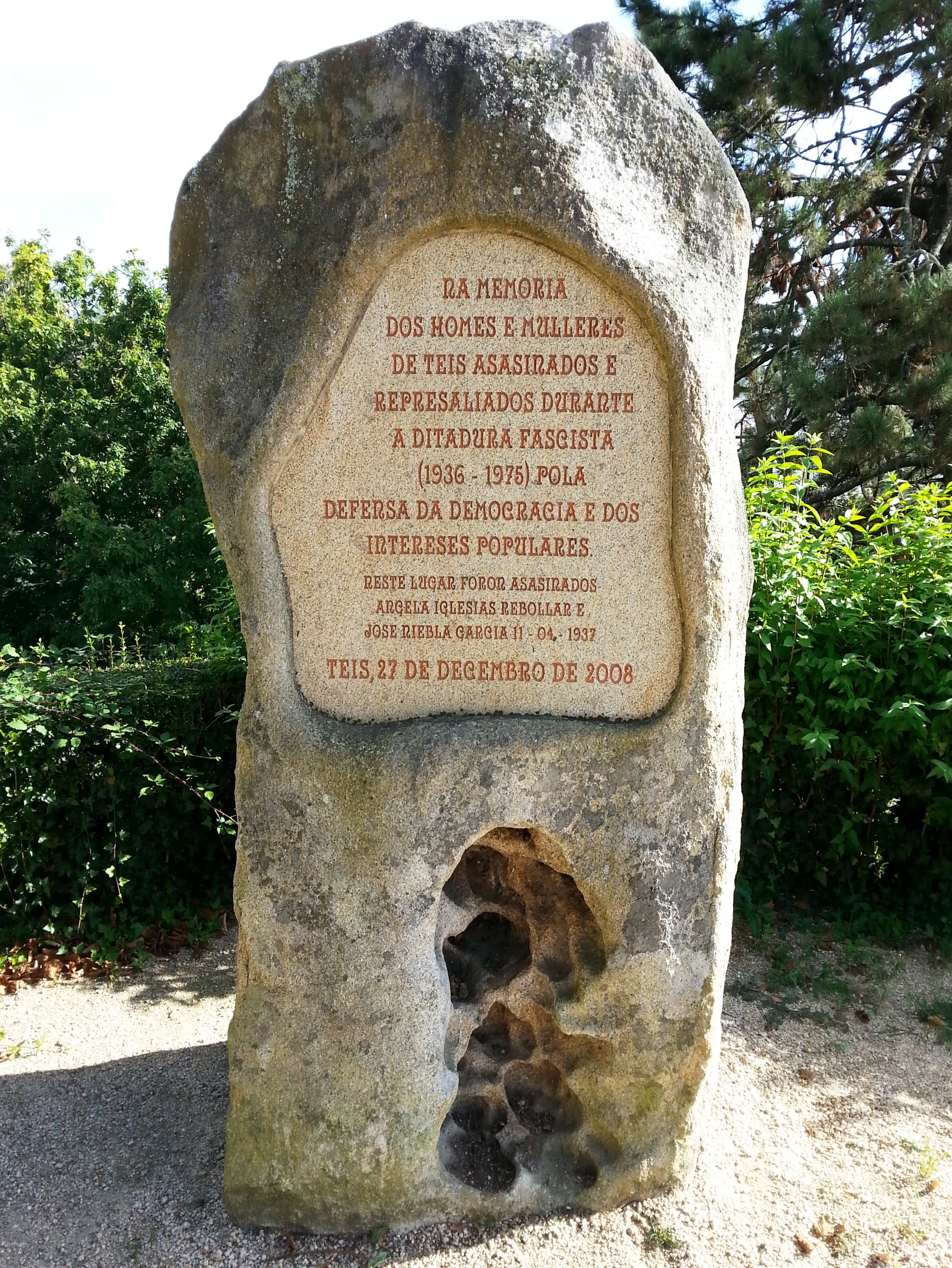 NA MEMORIADOS HOMES E MULLERESDE TEIS ASASINADOS EREPRESALIADOS DURANTEA DITADURA FASCISTA(1936-1975) POLADEFENSA DA DEMOCRACIA E DOSINTERESES POPULARESNESTE LUGAR FORON ASASINADOSÁNGELA IGLESIAS REBOLLAR EJOSÉ NIEBLA GARCÍA 11-04-1937TEIS, 25 DE DECEMBRO DE 2008